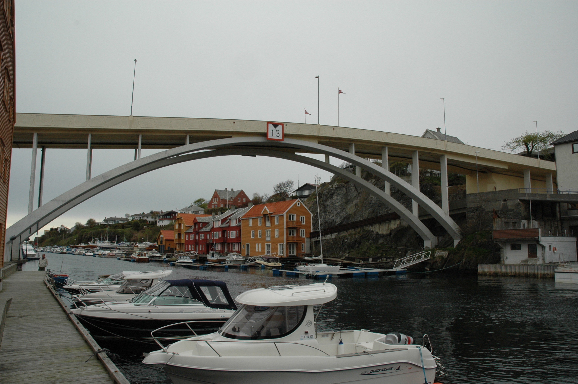 Bakerøybrua i Haugesund